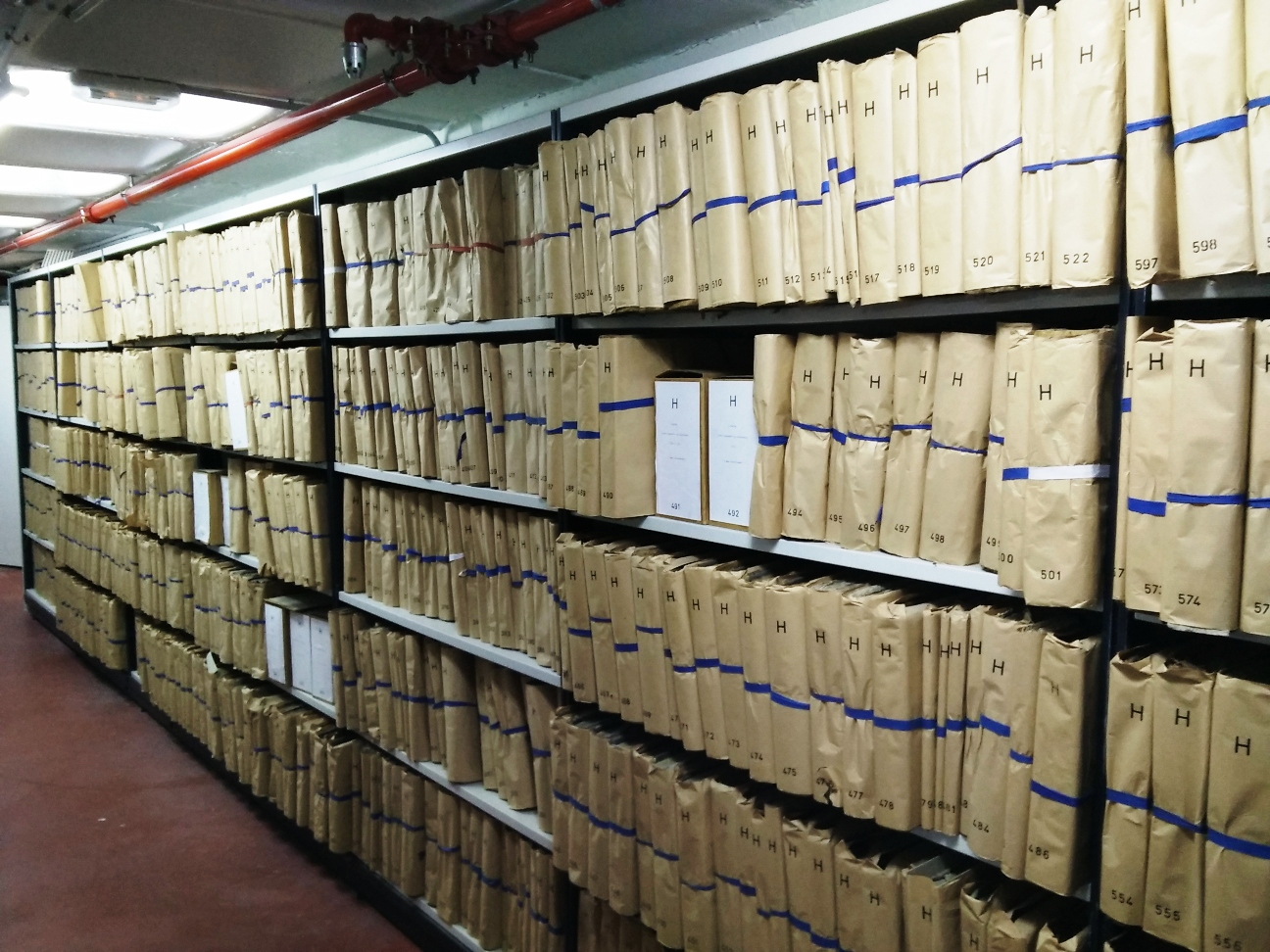 Depósito del fondo de Contadurías de Hipotecas